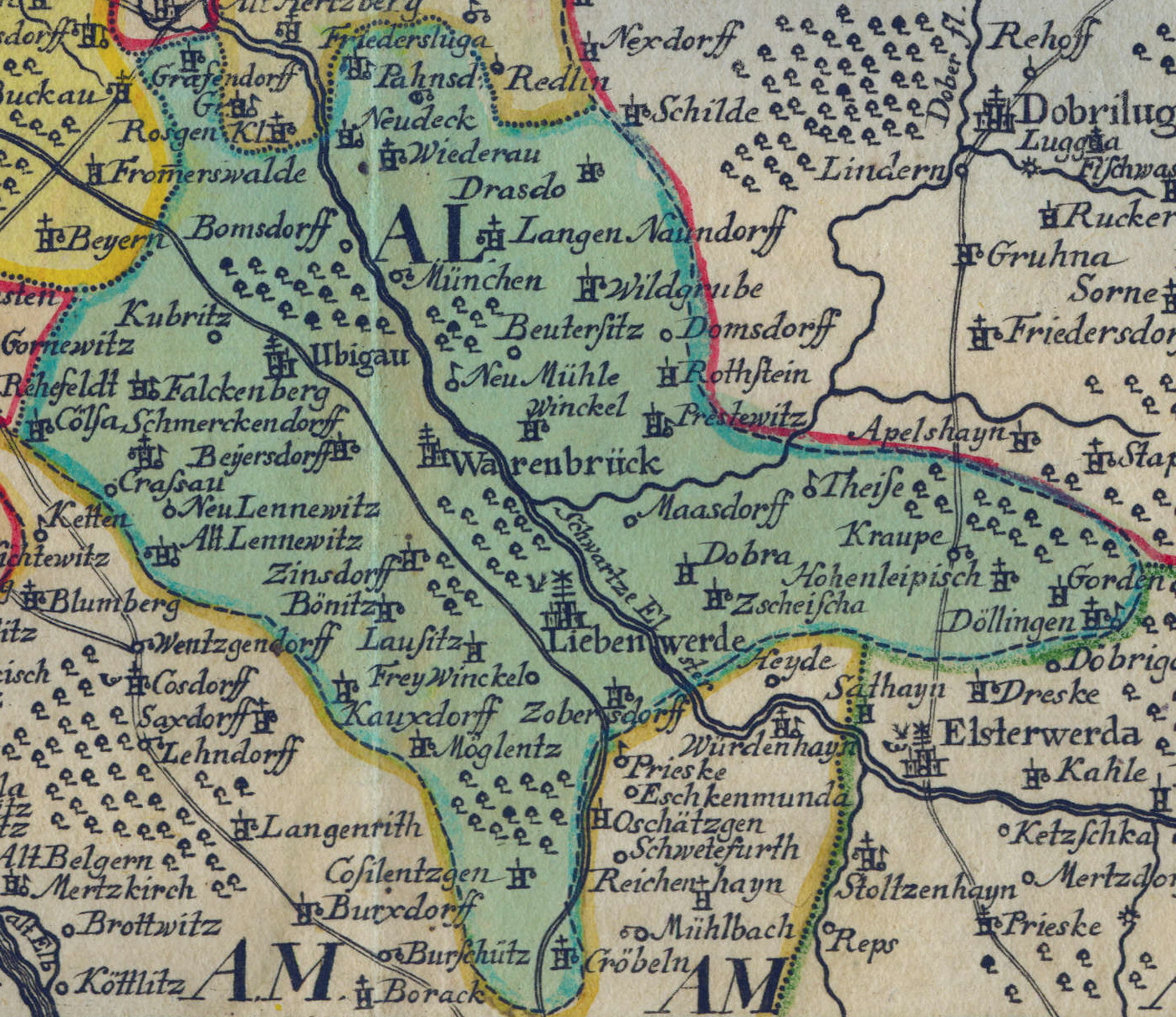 Amt Liebenwerda